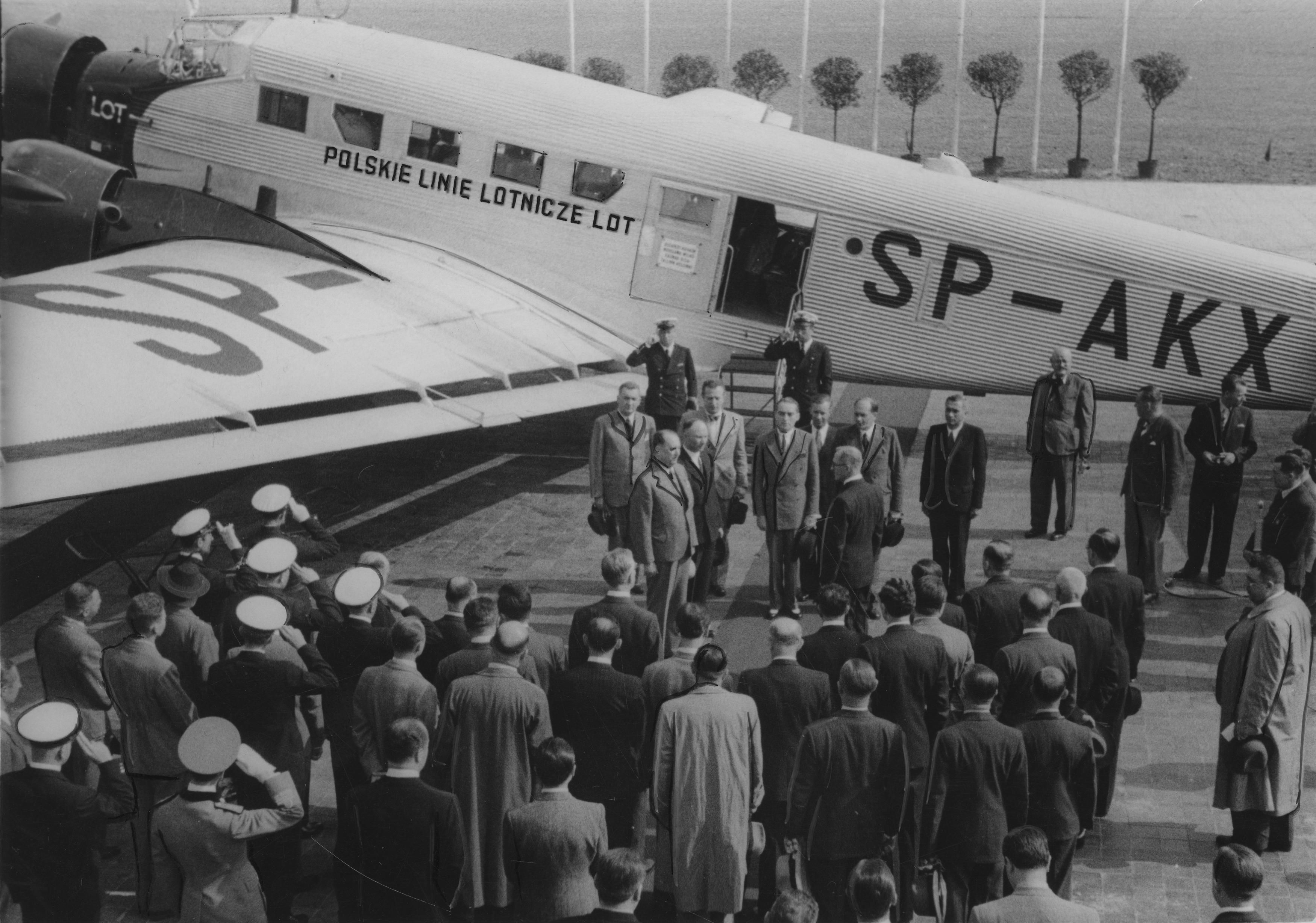 Samolot PLL LOT Junkers Ju-52/3m znak SP-AKX.